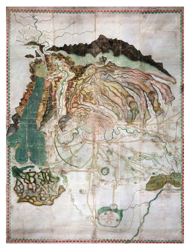 Più antica mappa dei territori limitrofi di Verona